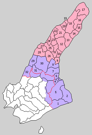 兵庫県津名郡の町村制時点の町村。